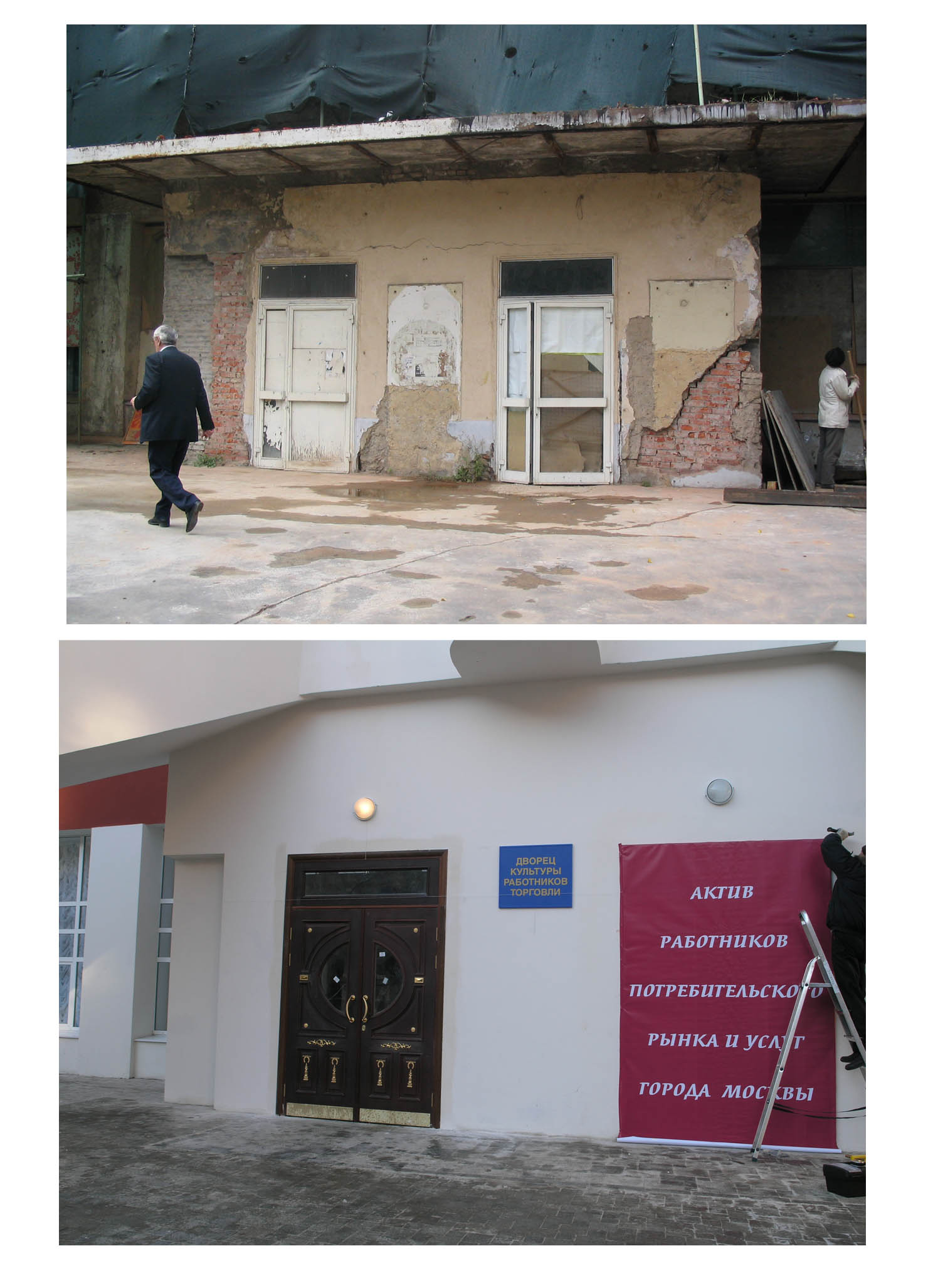 Клуб фабрики "Свободы" до и после реставрации ООО "ИНТЭС".